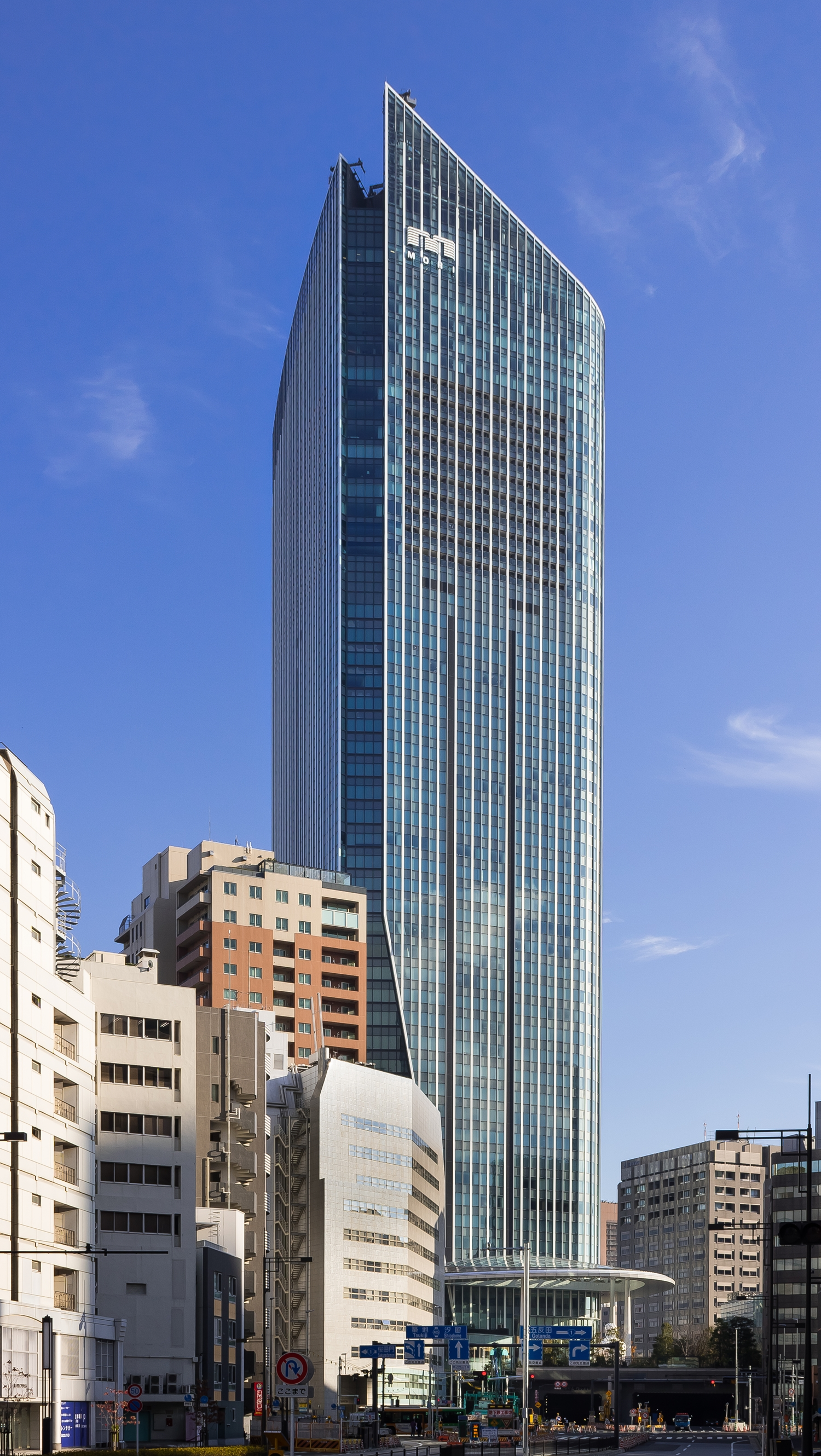 虎ノ門ヒルズ（東京都港区）